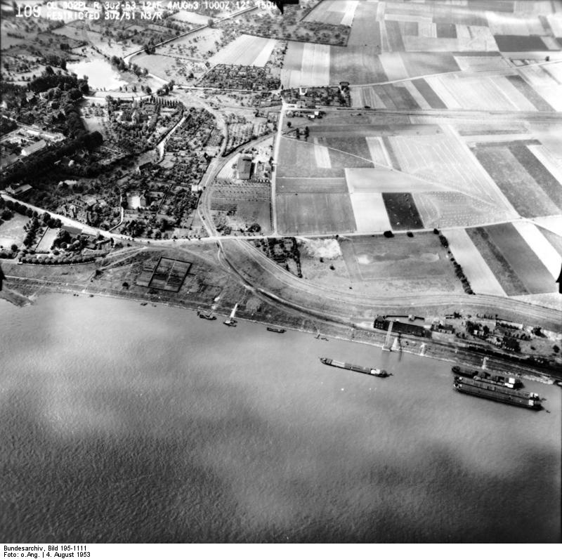 Rheinbefliegung der Alliierten 1953